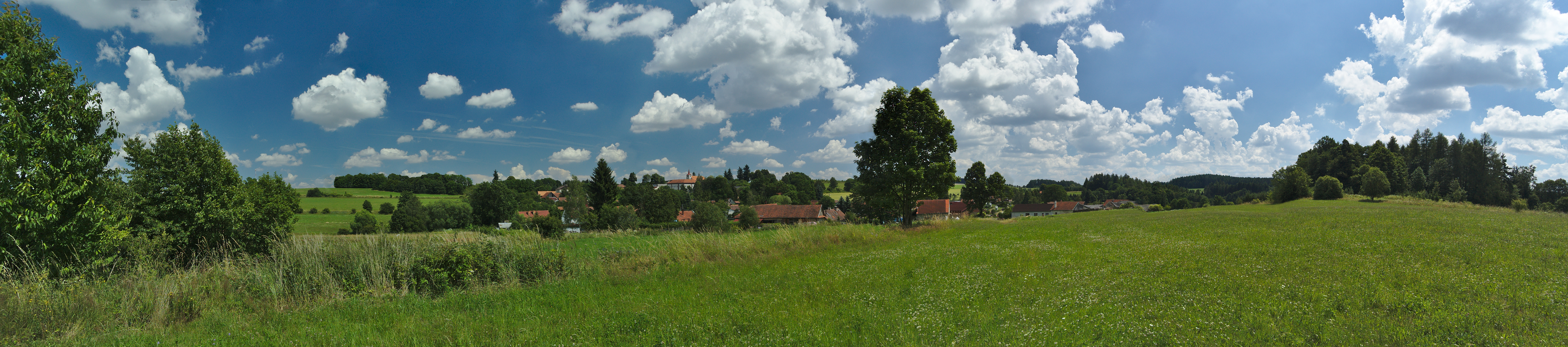 Skřípov - panorama, okres Prostějov